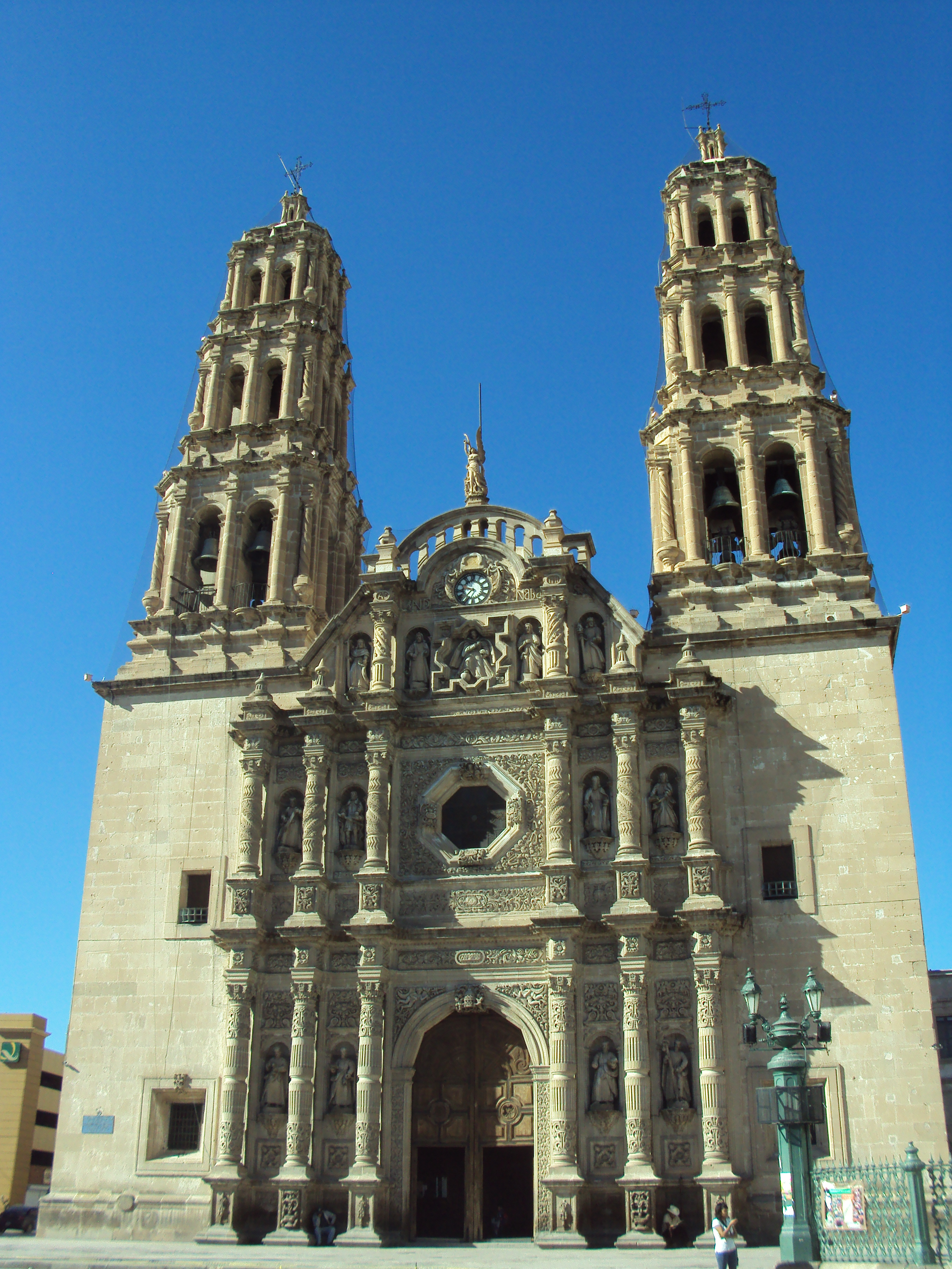 Catedral de Chihuahua, Chih.